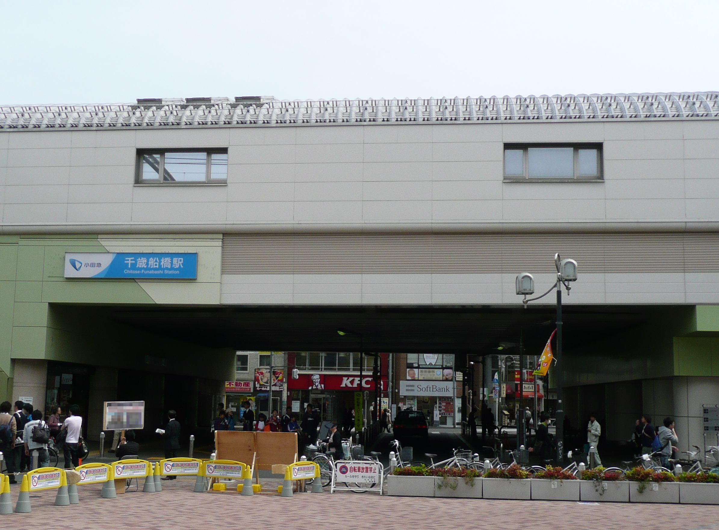 千歳船橋駅北口